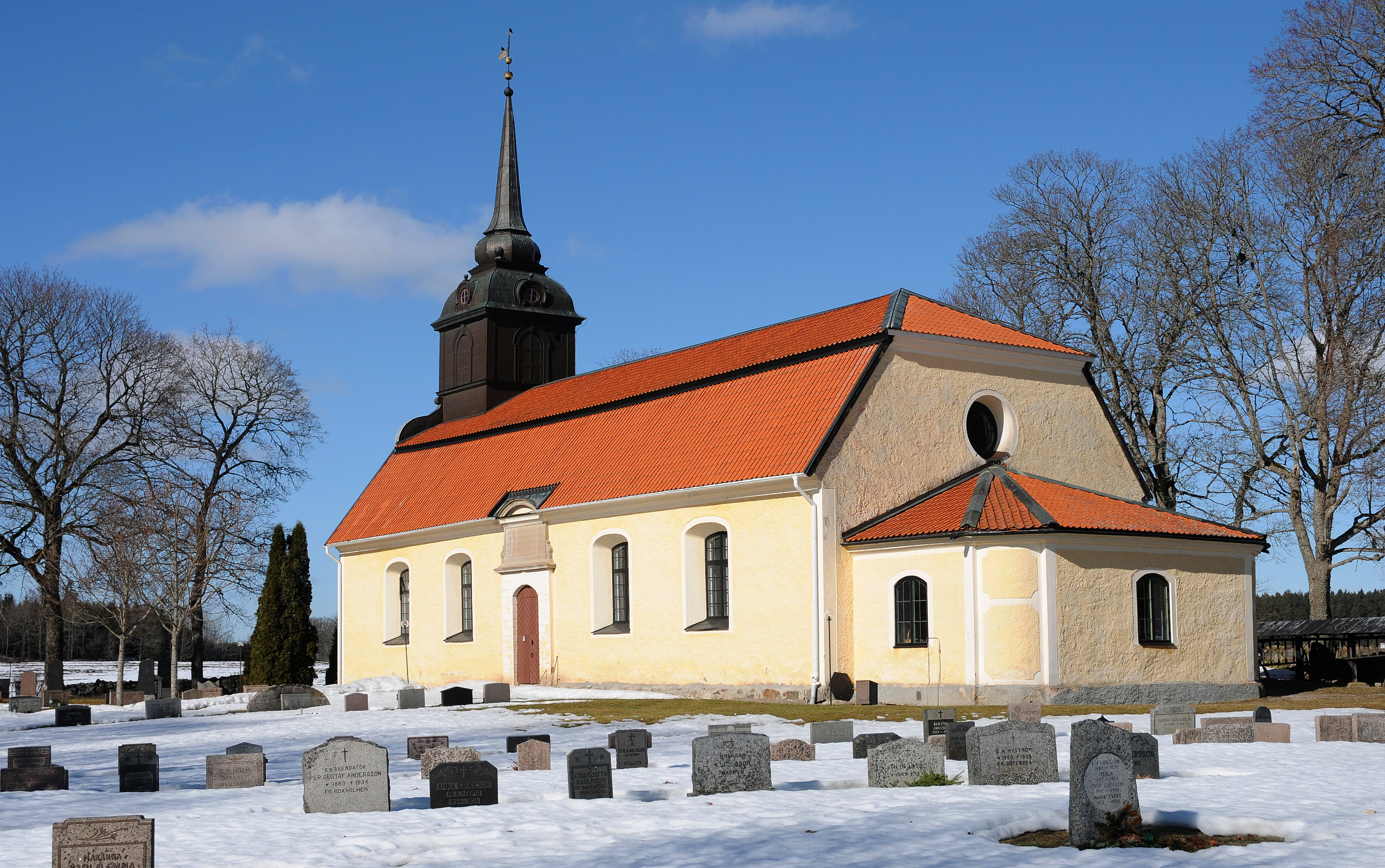 Lerbo kyrka i Katrineholms kommun i mars 2011